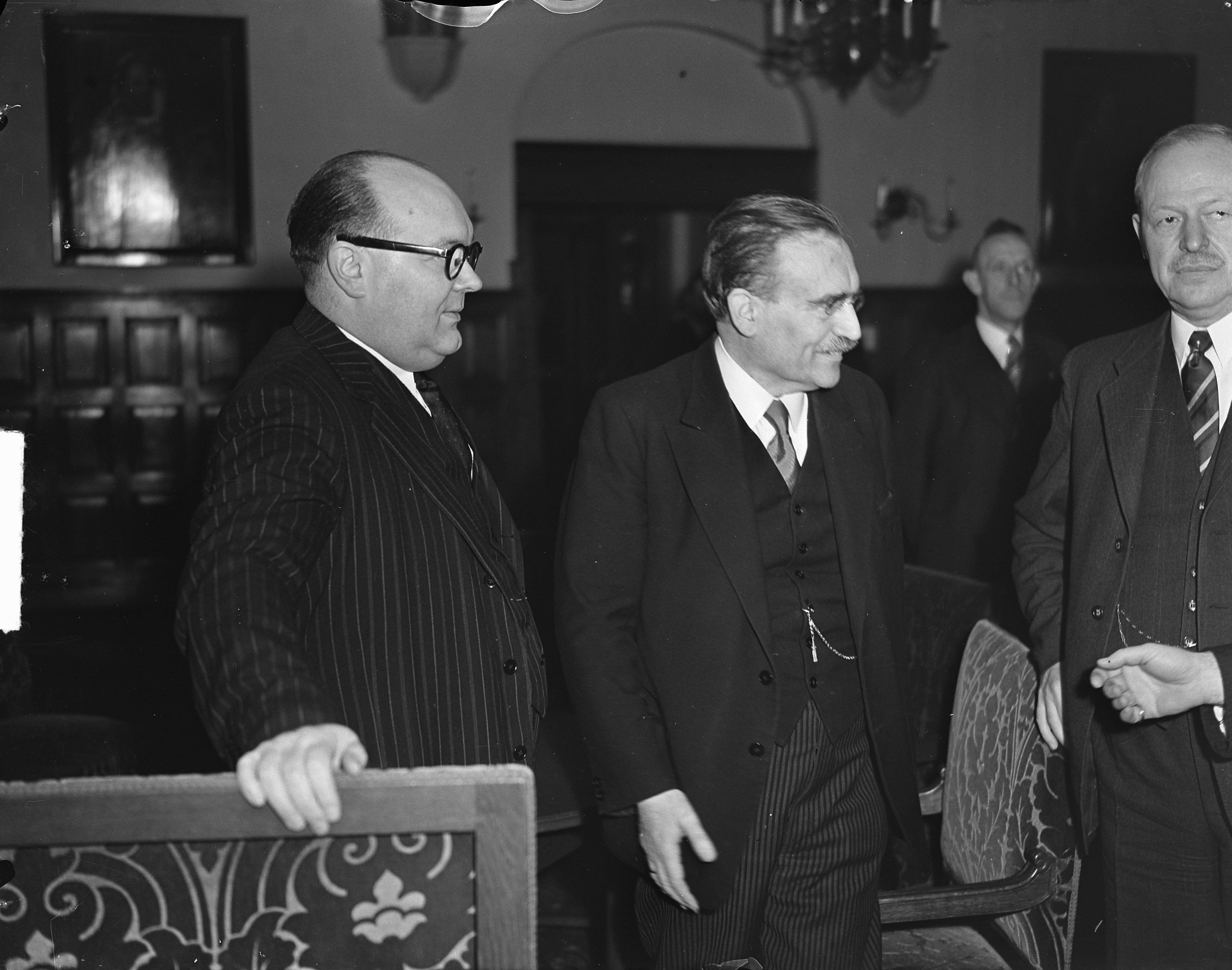 Collectie / Archief : Fotocollectie Anefo Reportage / Serie : [ onbekend ] Beschrijving : Benelux-conferentie in Den Haag van 10 t/m 12 maart 1949 in de vergaderzaal van de Eerste Kamer. De Belgische minister-president Spaak en dr. W. Drees Datum : 10 maart 1949 Locatie : Den Haag, Zuid-Holland Trefwoorden : conferenties, internationale organisaties, ministers Fotograaf : Noske, J.D. / Anefo Auteursrechthebbende : Nationaal Archief Materiaalsoort : Glasnegatief Nummer archiefinventaris : bekijk toegang 2.24.01.09 Bestanddeelnummer : 903-2601